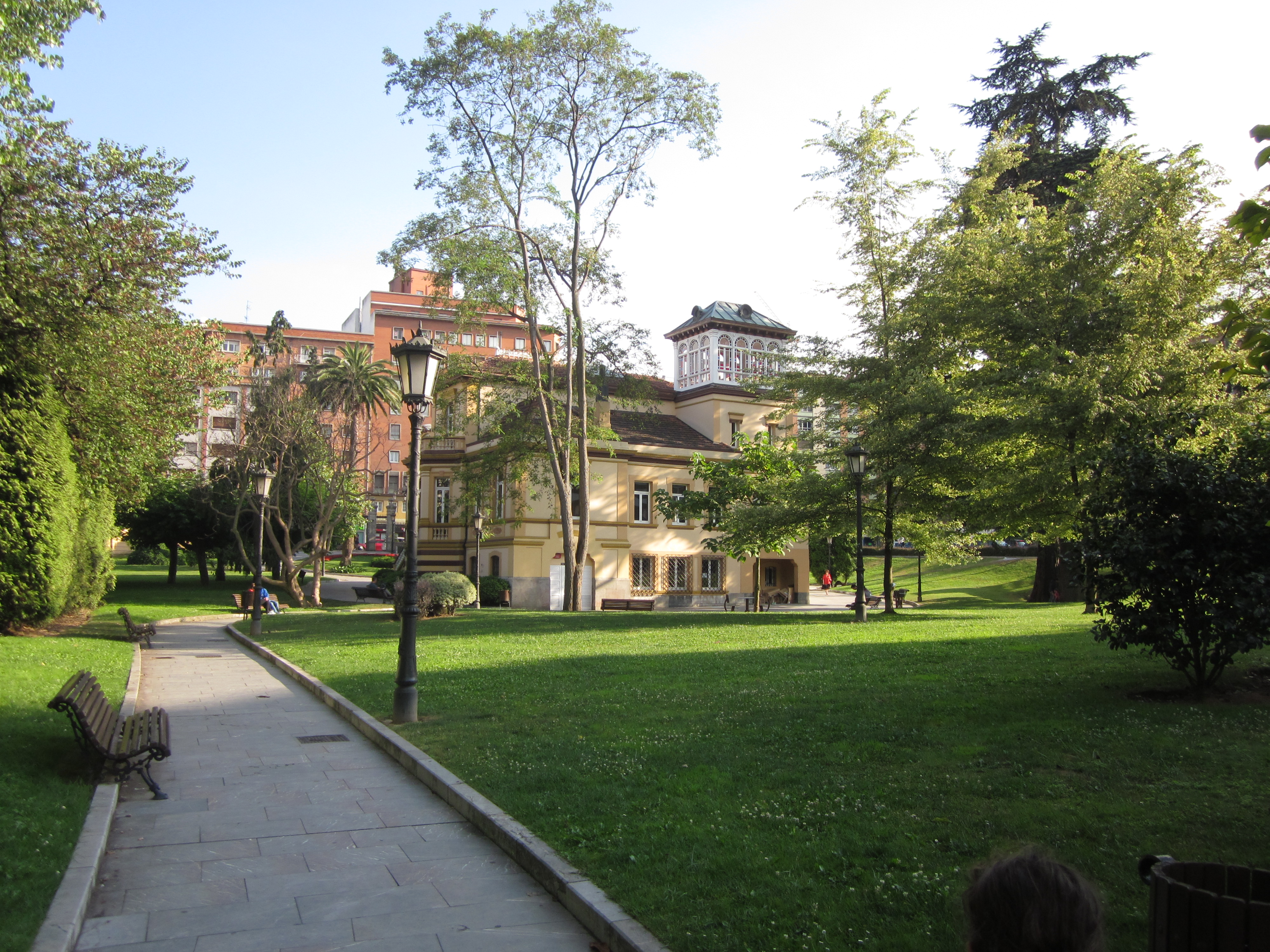 Villa Magdalena y sus jardines. Fachada posterior. Oviedo. Principado de Asturias. España.